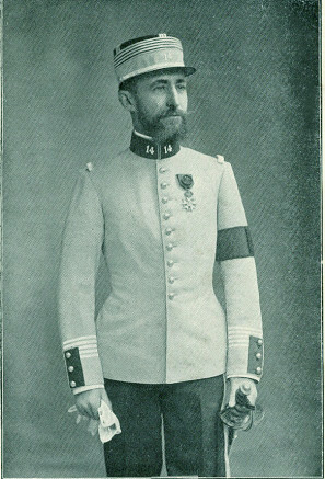 Alebrt BARATIER_colonel_du_14_chasseur.